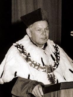 Włodzimierz Kotowski, rektor WSI w Opolu (1987-1990)